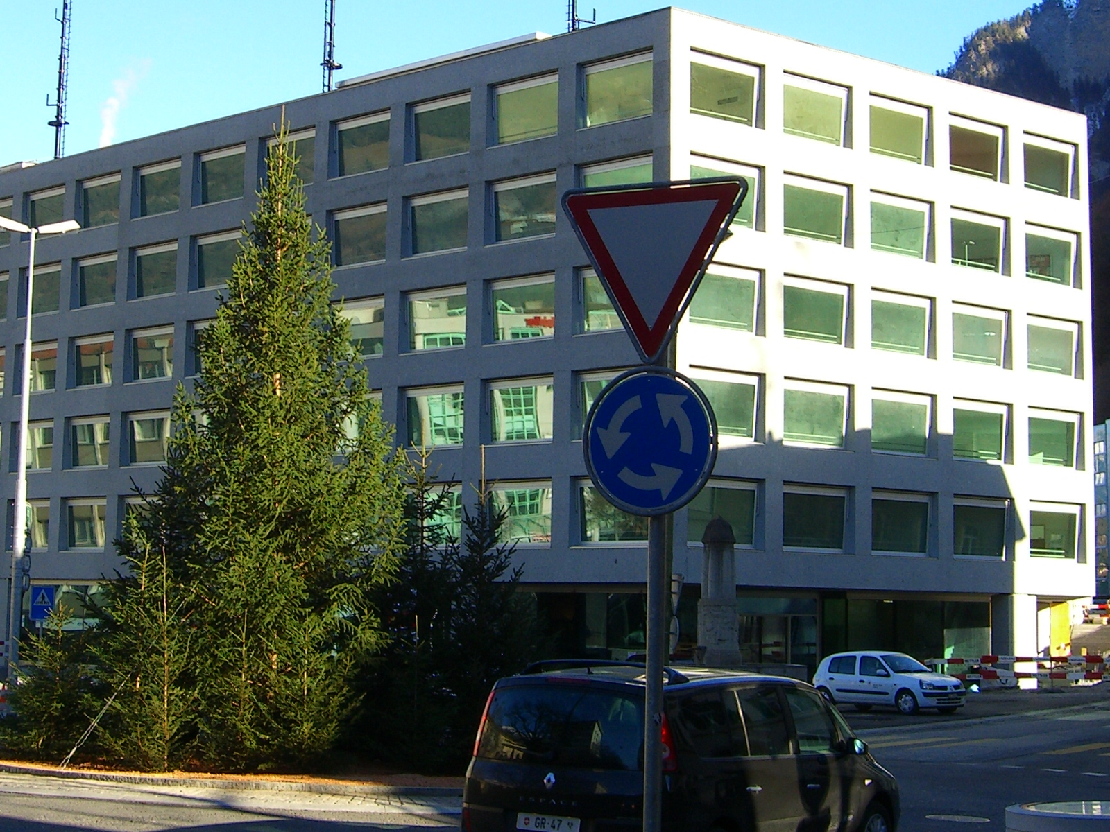 Stadtverwaltung in Chur, Hauptgebäude, Inbetrienahme im Dezember 2005. Quelle:Bravuogn; Autor:Bravuogn